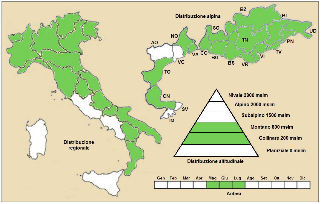 Clematis recta - Distribuzione